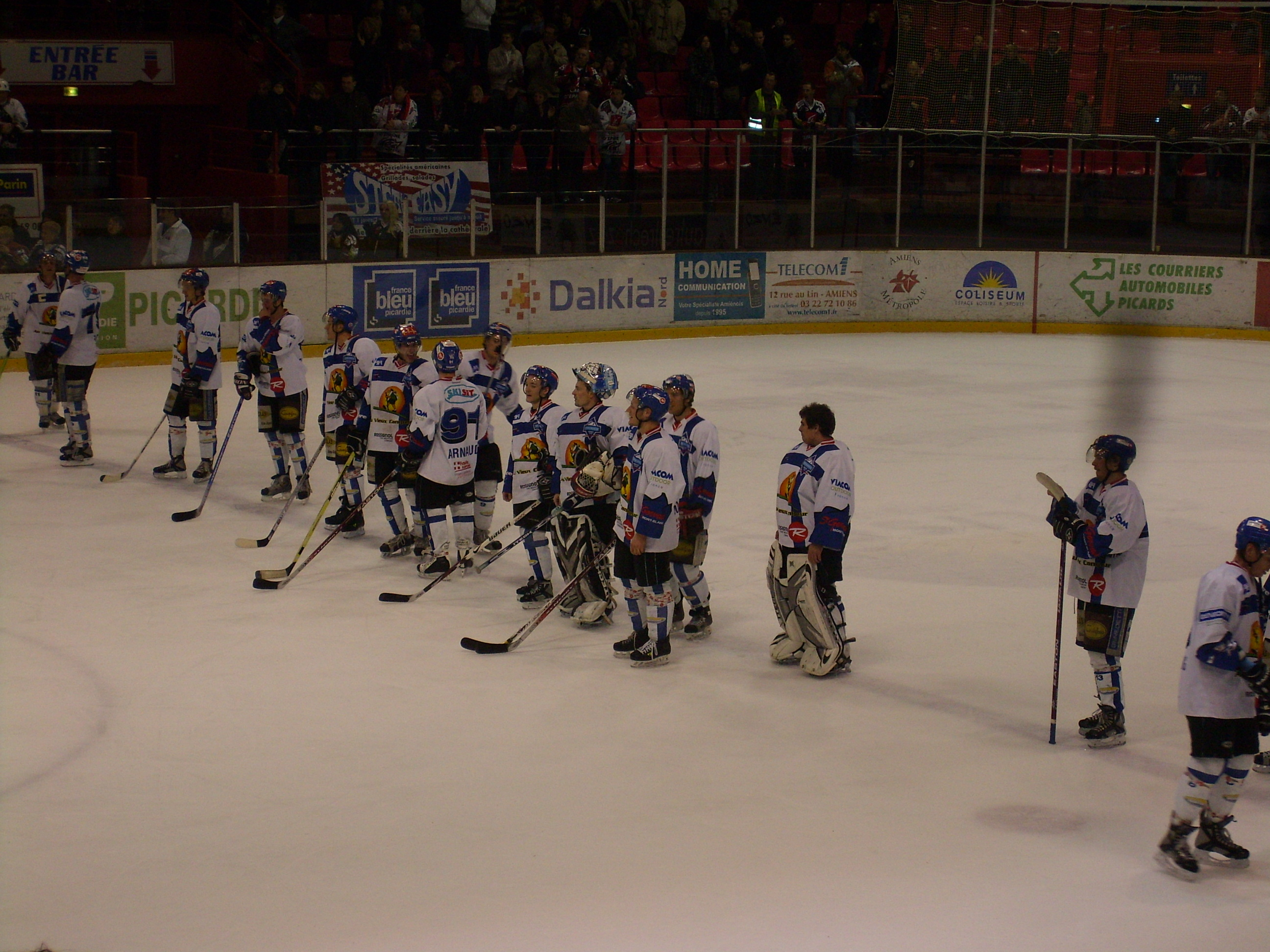 Equipe de Mont-Blanc Hockey Club, au cours du 3e match du 1er tour des play-off, Amiens.